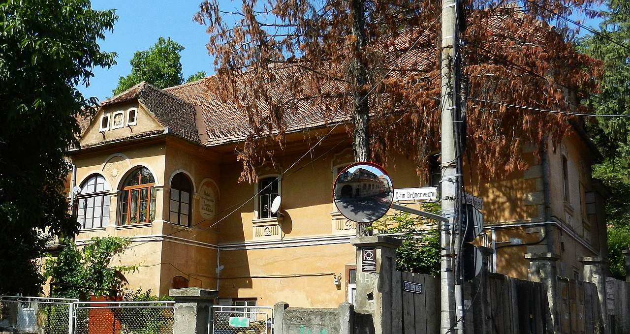 Conacul familiei Brâncoveanu - Prinzhaus